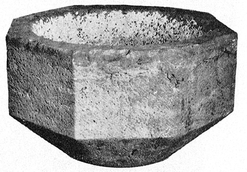 Östra Frölunda kyrka. Dopfunt